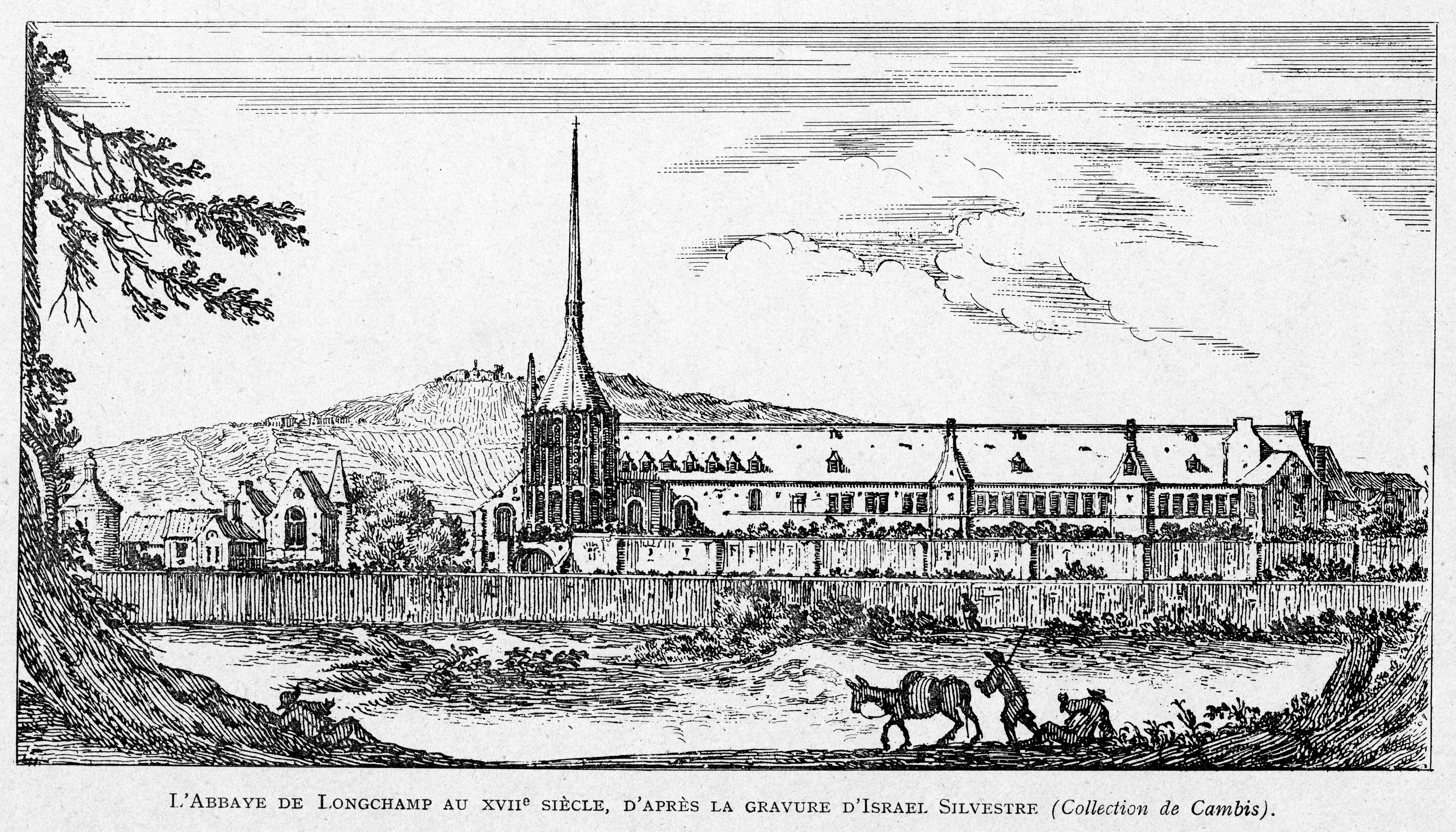 Corbel006 L' abbaye de Longchamp au XVIIe siècle, d'apres la gravure d'Israël Silvestre